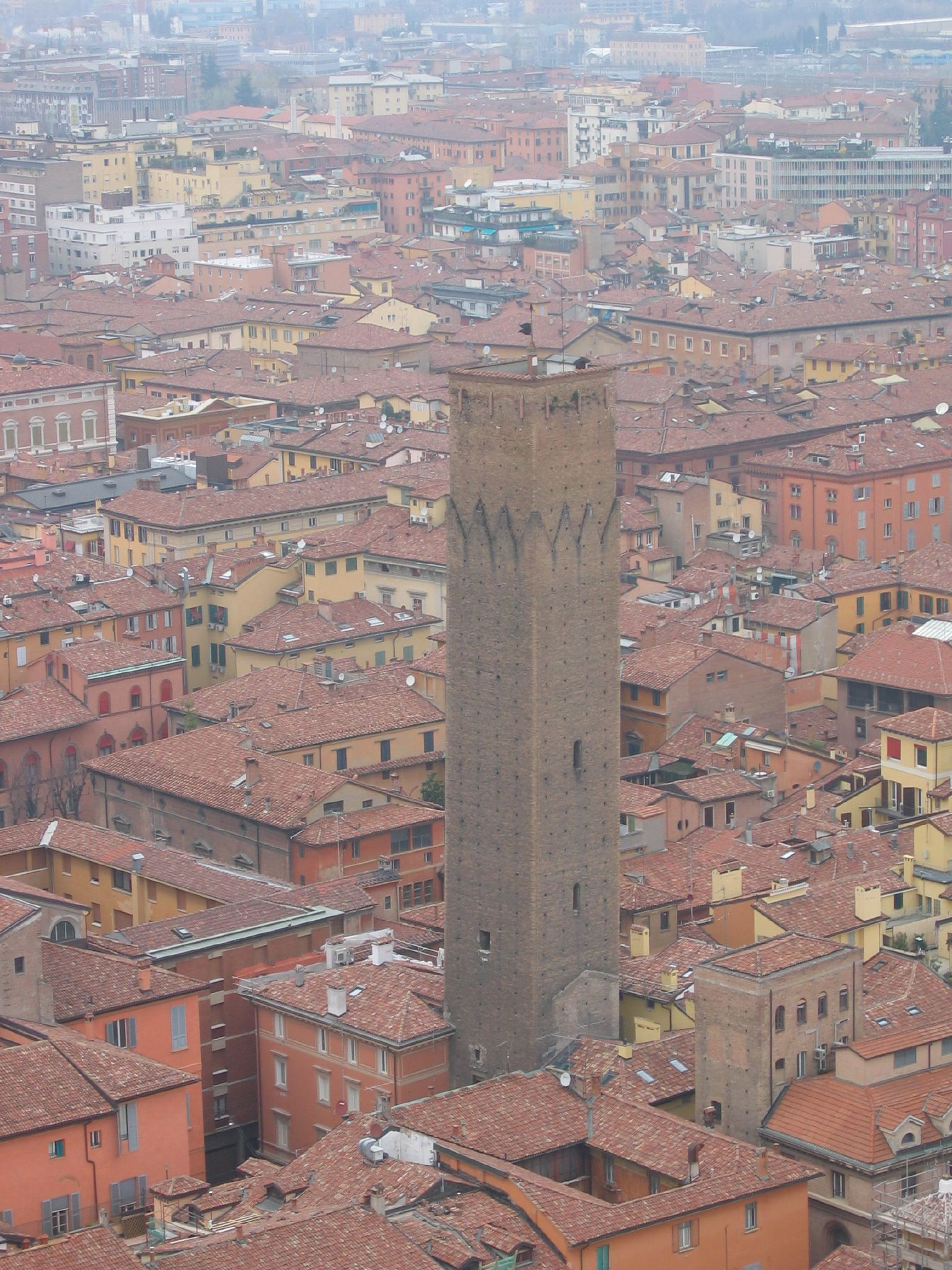 Torre dei Prendiparte a Bologna,Italia